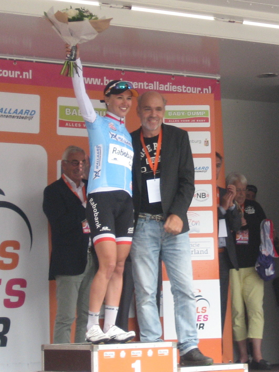 Katarzyna Niewiadoma, winnares van het jongerenklassement van de Boels Ladies Tour 2016, op de Cauberg in Valkenburg, Limburg.